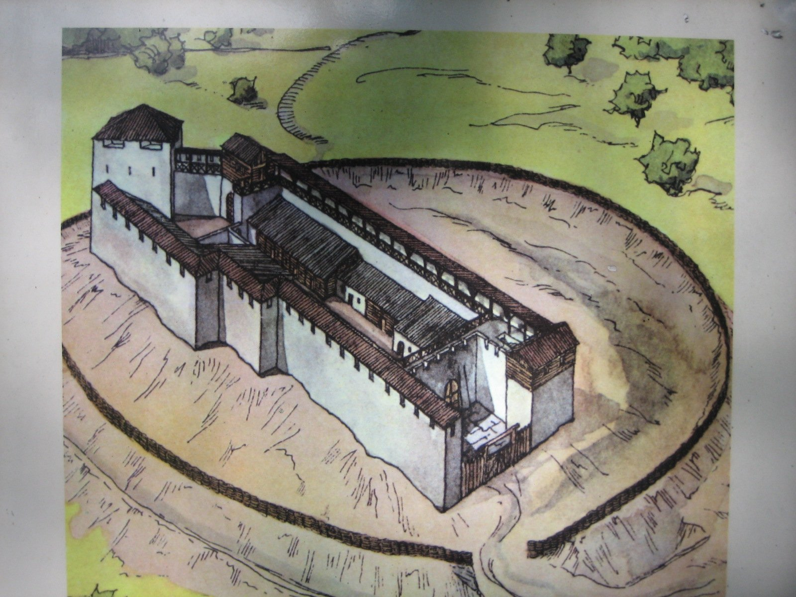 Vermutliches Aussehen der römischen Anlage am "Bürgle"